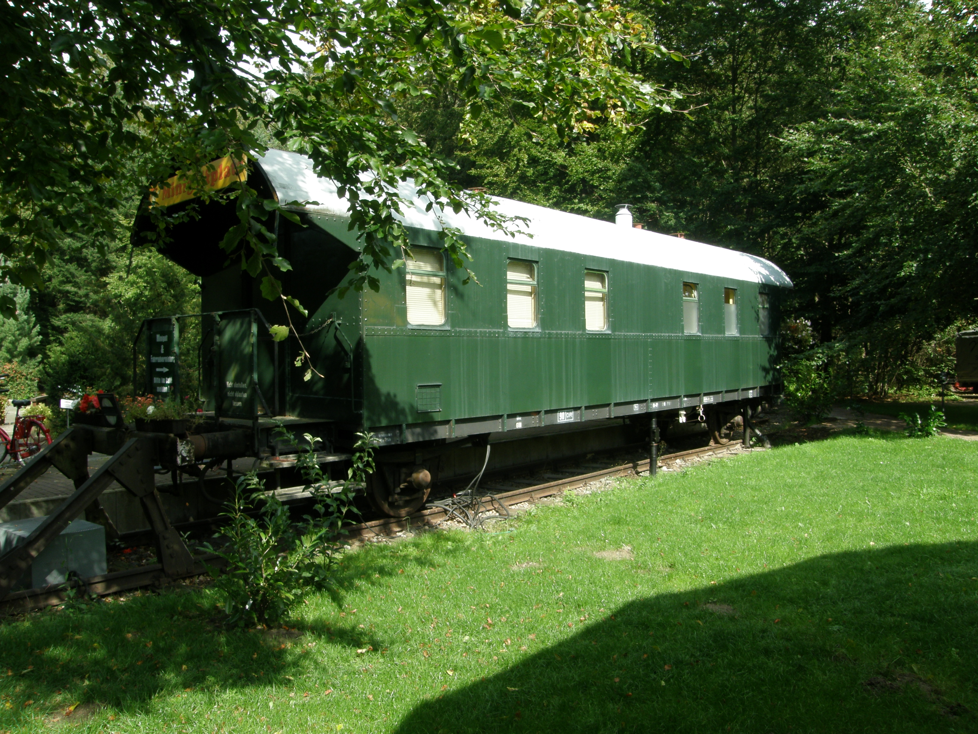 Bernau, Waldsiedlung: ein ausrangierter Personenwagen als Büro für die Minigolfanlage